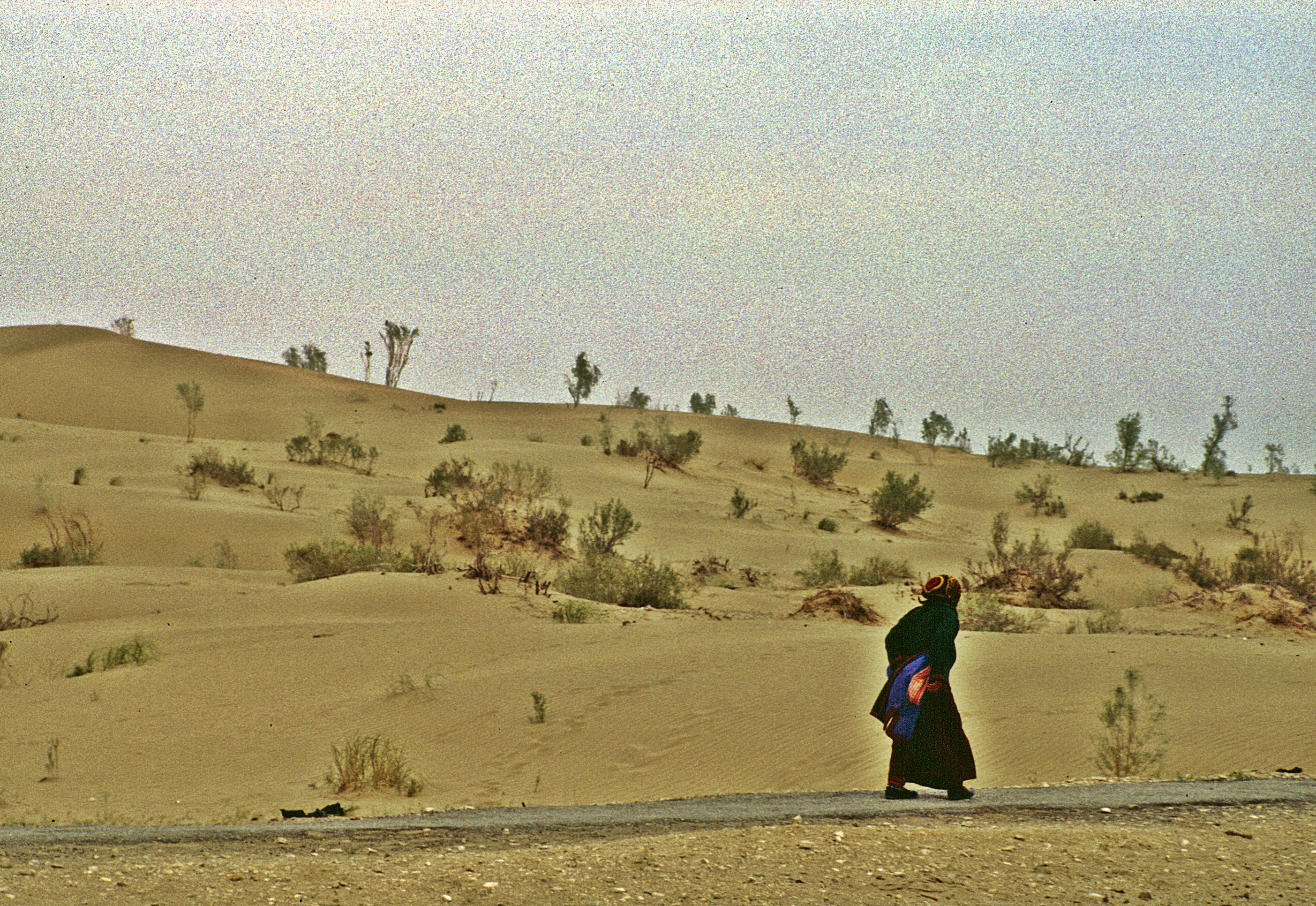 Karakum